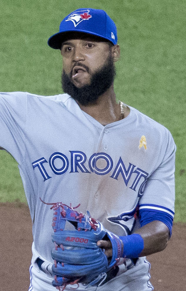 Blue Jays at Orioles 9/1/17